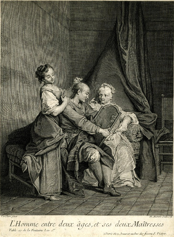 Gravure réalisée par Michel Aubert d'après un dessin de Sébastien Leclerc le Jeune représentant la fable L'Homme entre deux âges et ses deux maîtresses de Jean de La Fontaine.